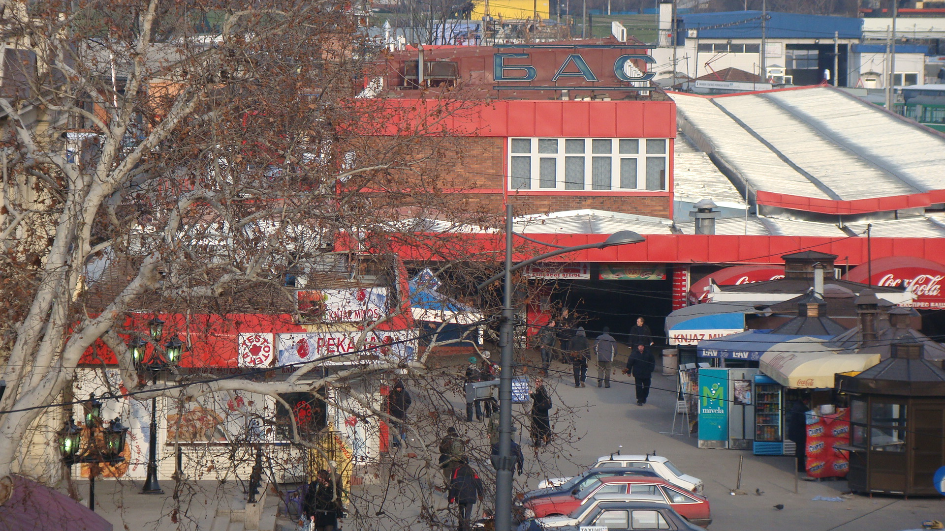 Belgrade Serbia